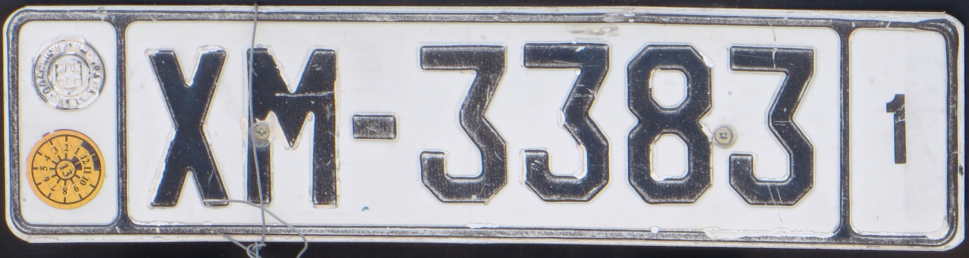 Griekse kentekenplaat 1972-1982